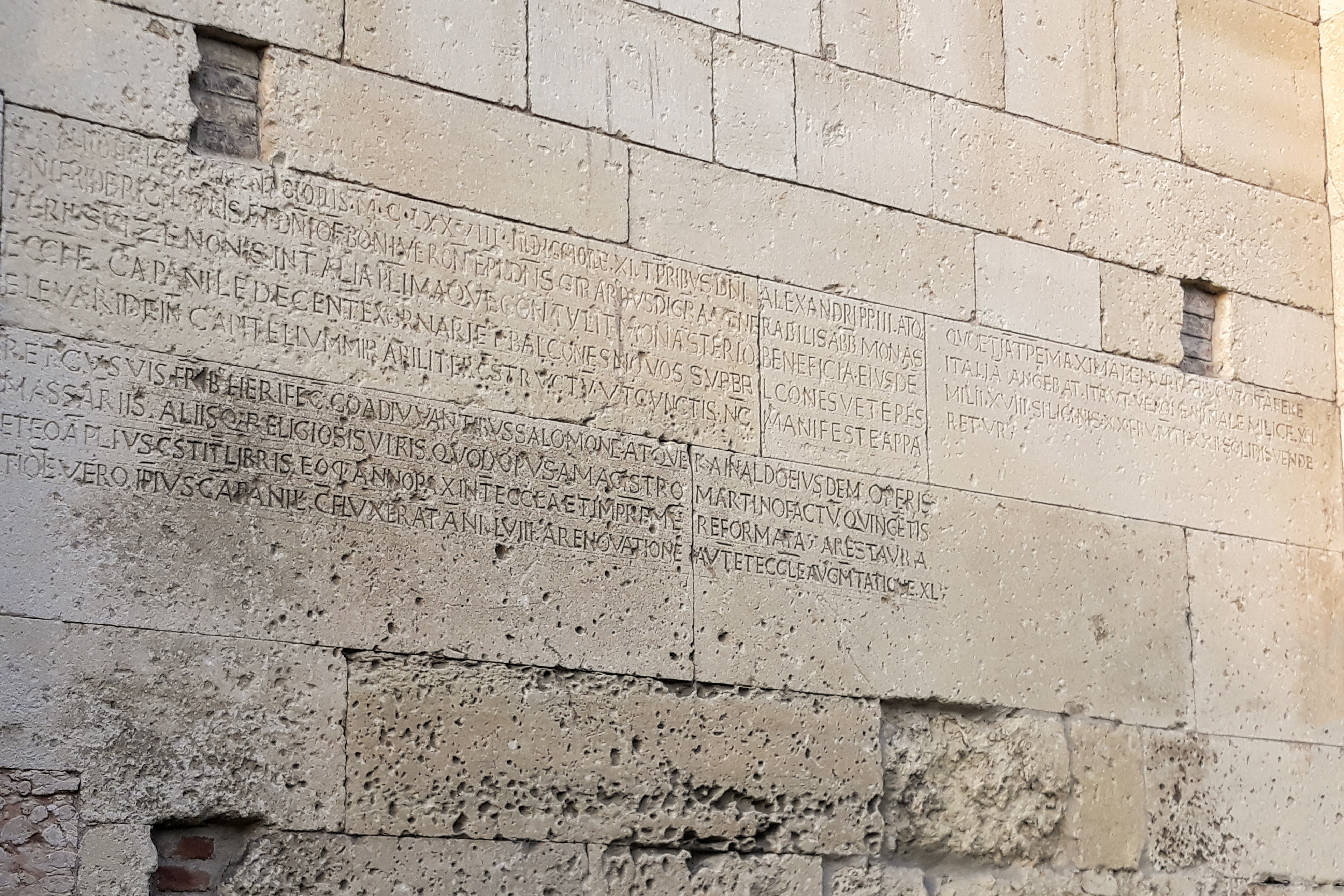 Basilica di San Zeno a Verona